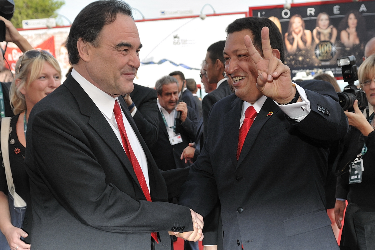 66ème Festival du Cinéma de Venise (Mostra), 6ème jour (07/09/2009) Hugo Chavez Le président du Venezuela a volé la vedette aux stars de cinéma après la projection de South of the border, un documentaire au ton hagiographique où l'Américain Oliver Stone défend sa révolution pacifiste